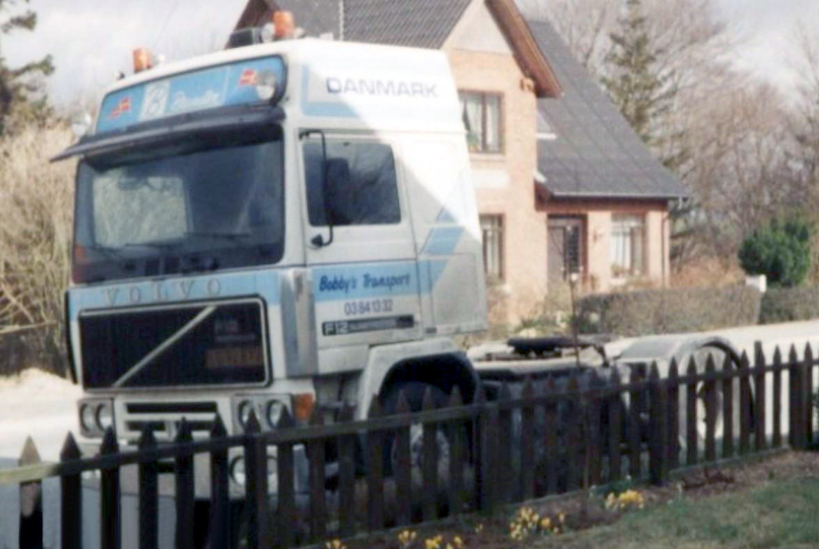 Volvo F 12 Intercooler